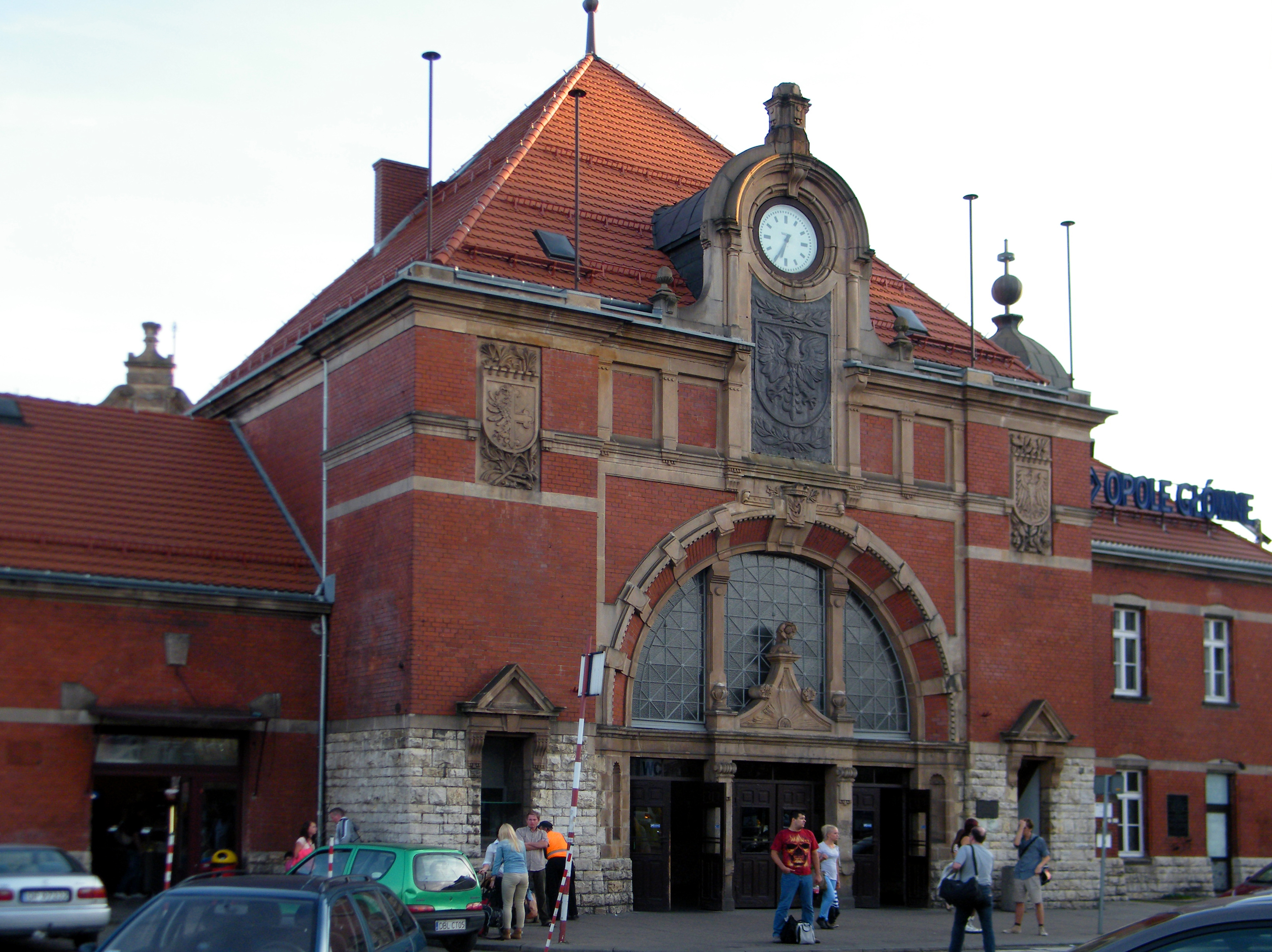 Opole, ul. Krakowska - zespół dworca PKP: budynek główny z przejściem podziemnym, pocz. XX